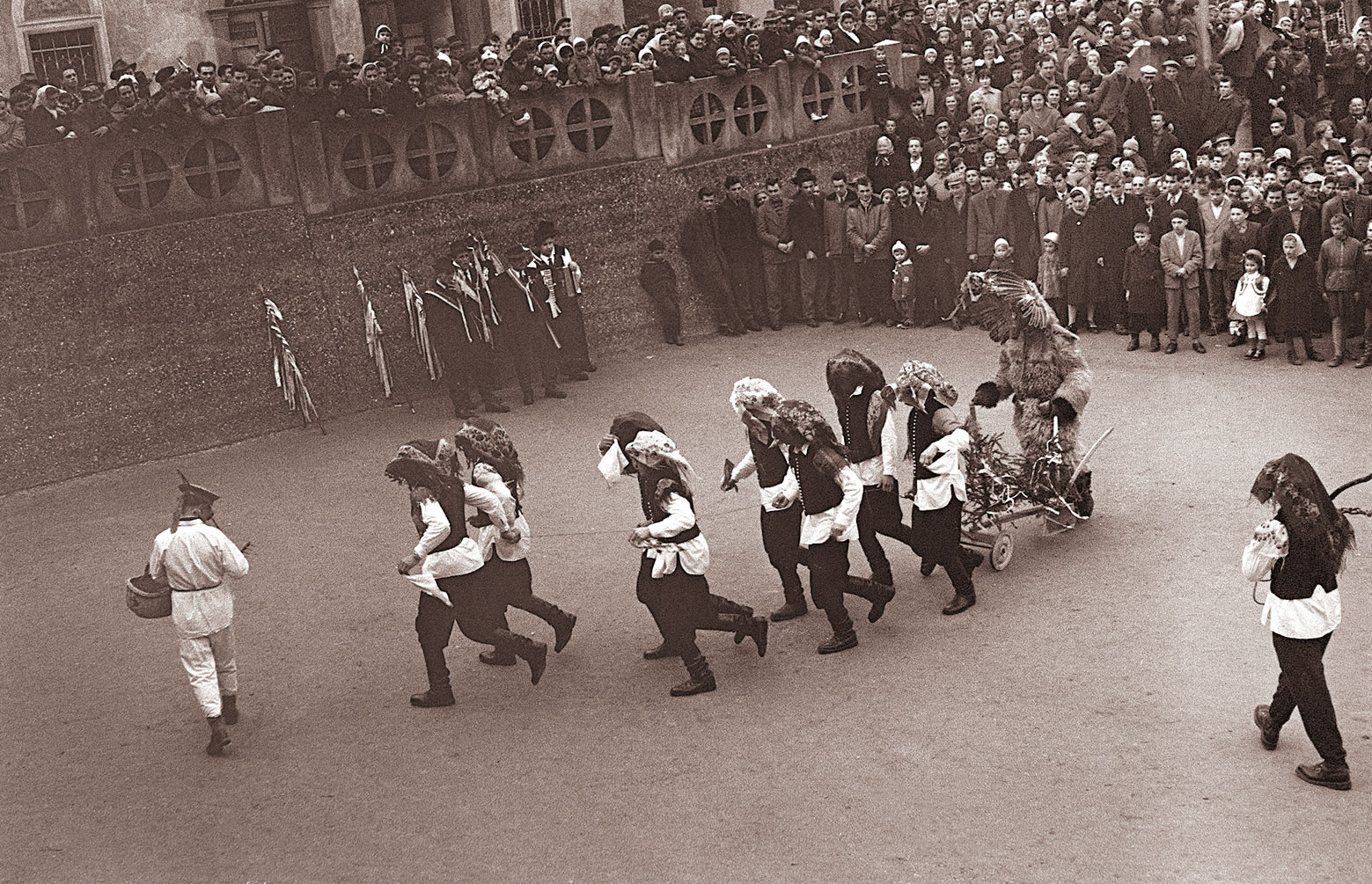 Veliko kurentovanje na Ptuju.